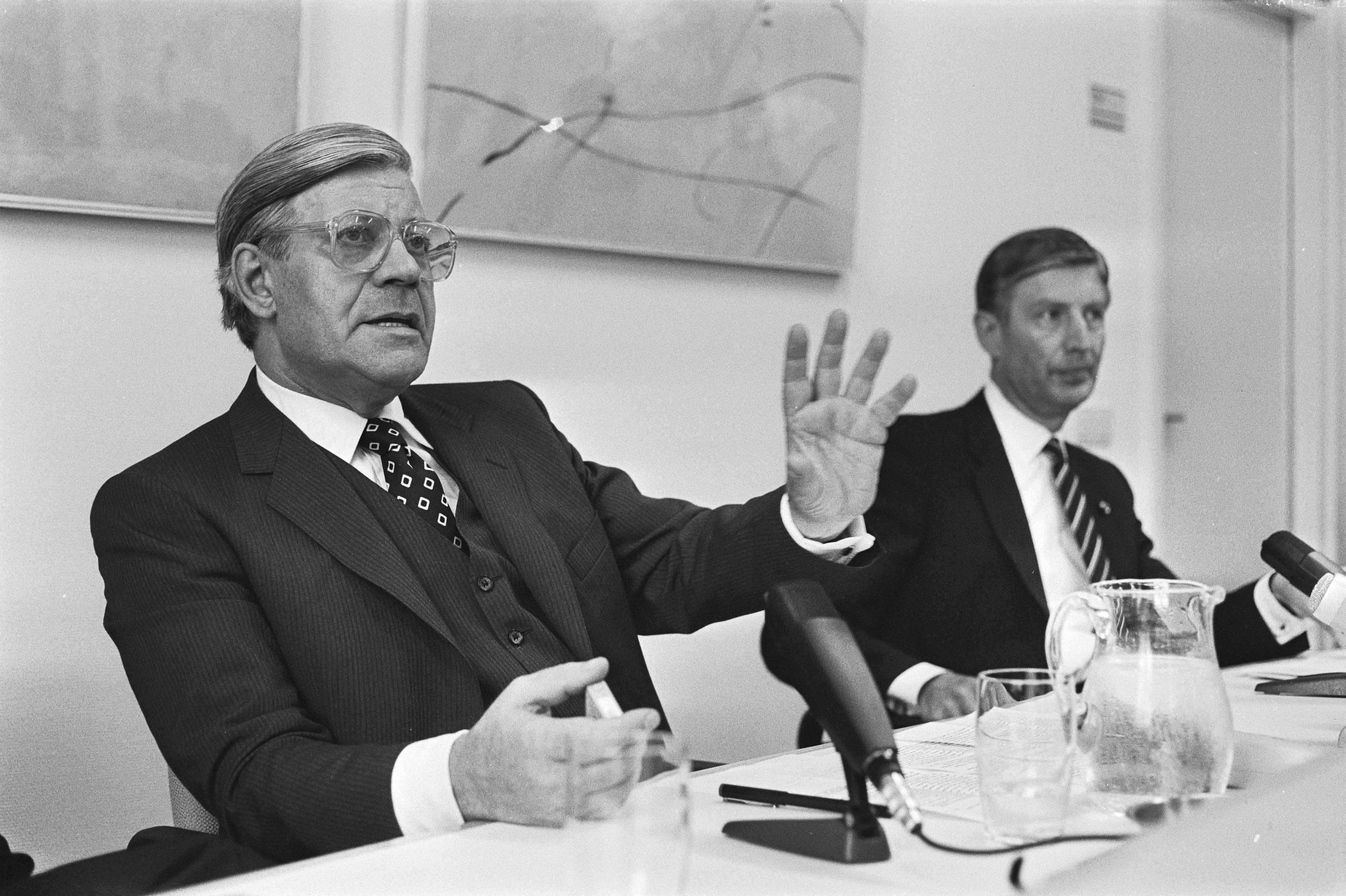 Collectie / Archief : Fotocollectie Anefo Reportage / Serie : [ onbekend ] Beschrijving : Persconferentie Helmut Schmidt , rechts premier Van Agt Datum : 9 juli 1982 Trefwoorden : persconferenties Persoonsnaam : Agt, Dries van, Schmidt, Helmut Fotograaf : Antonisse, Marcel / Anefo Auteursrechthebbende : Nationaal Archief Materiaalsoort : Negatief (zwart/wit) Nummer archiefinventaris : bekijk toegang 2.24.01.05 Bestanddeelnummer : 932-2419